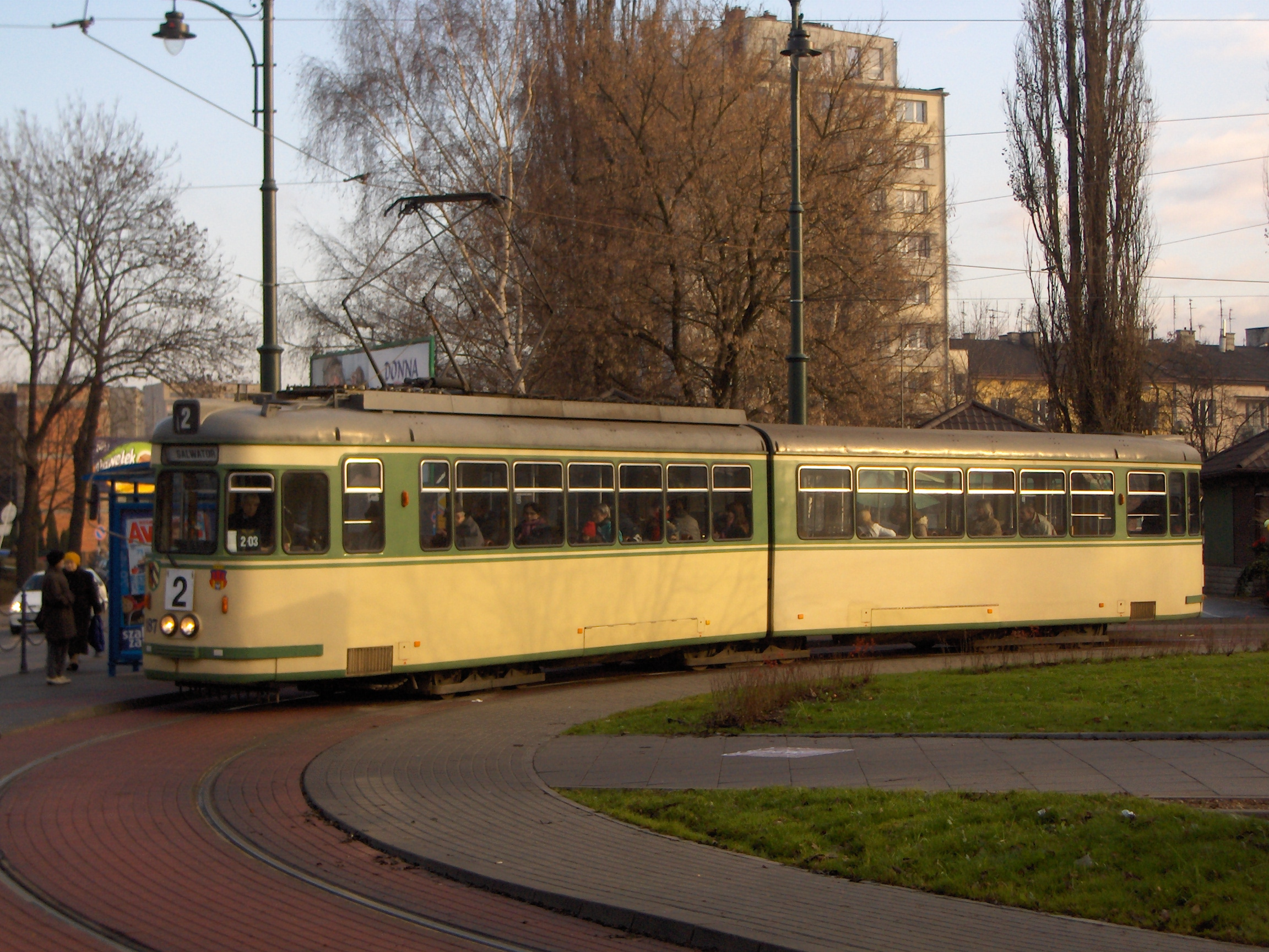 Wagon tramwajowy typu Man GT-6 nr 187 należący do MPK Kraków na pętli przy ulicy Rakowickiej . Tramwaj nosi malowanie norymberskie .